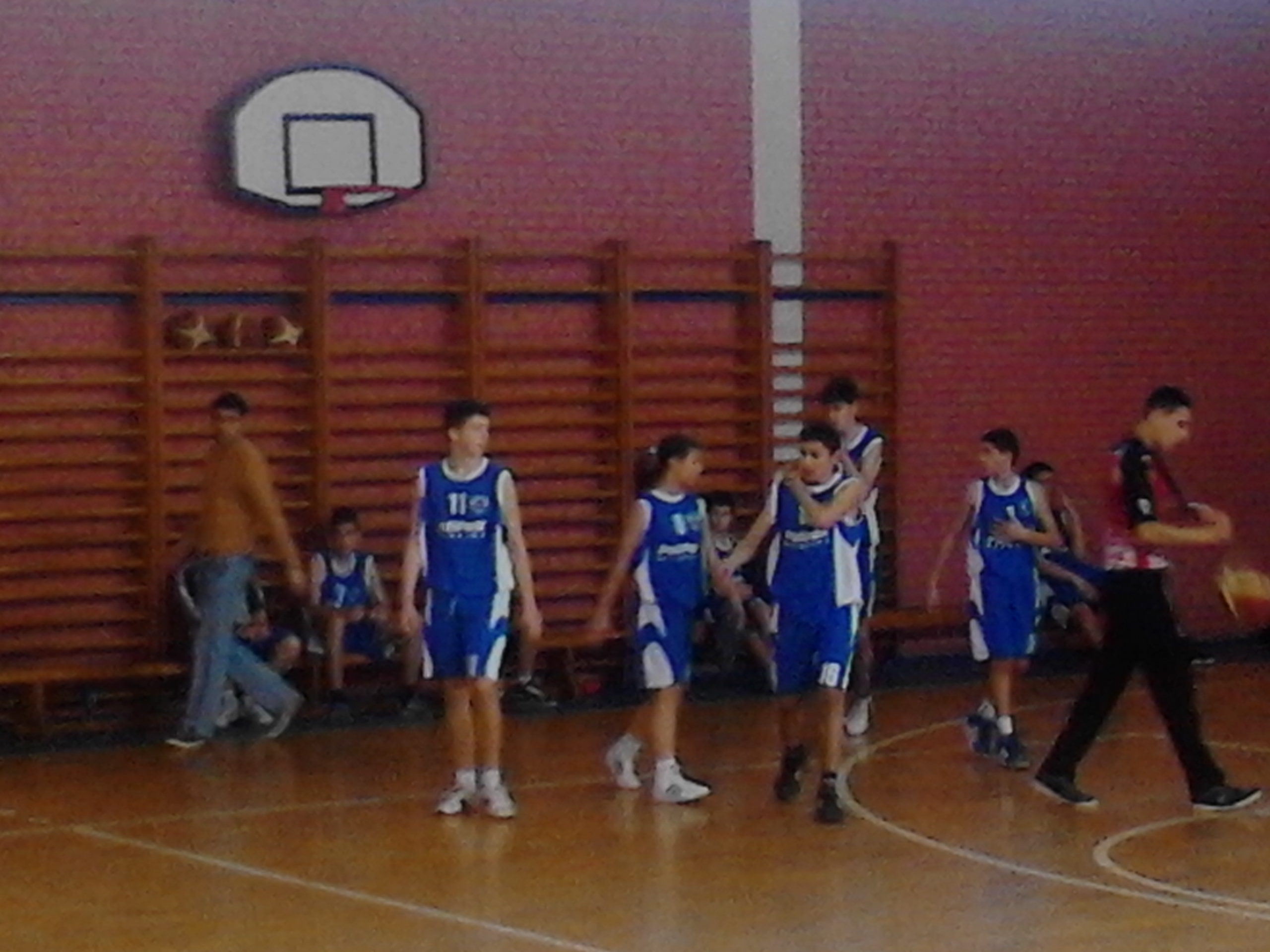 Srpski (latinica): Pioniri Sloga Batočina - KK Starinski Smederevo